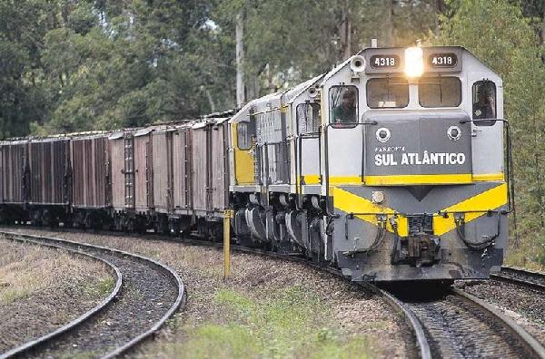 Locomotiva da Ferrovia Sul Atlântico (FSA).